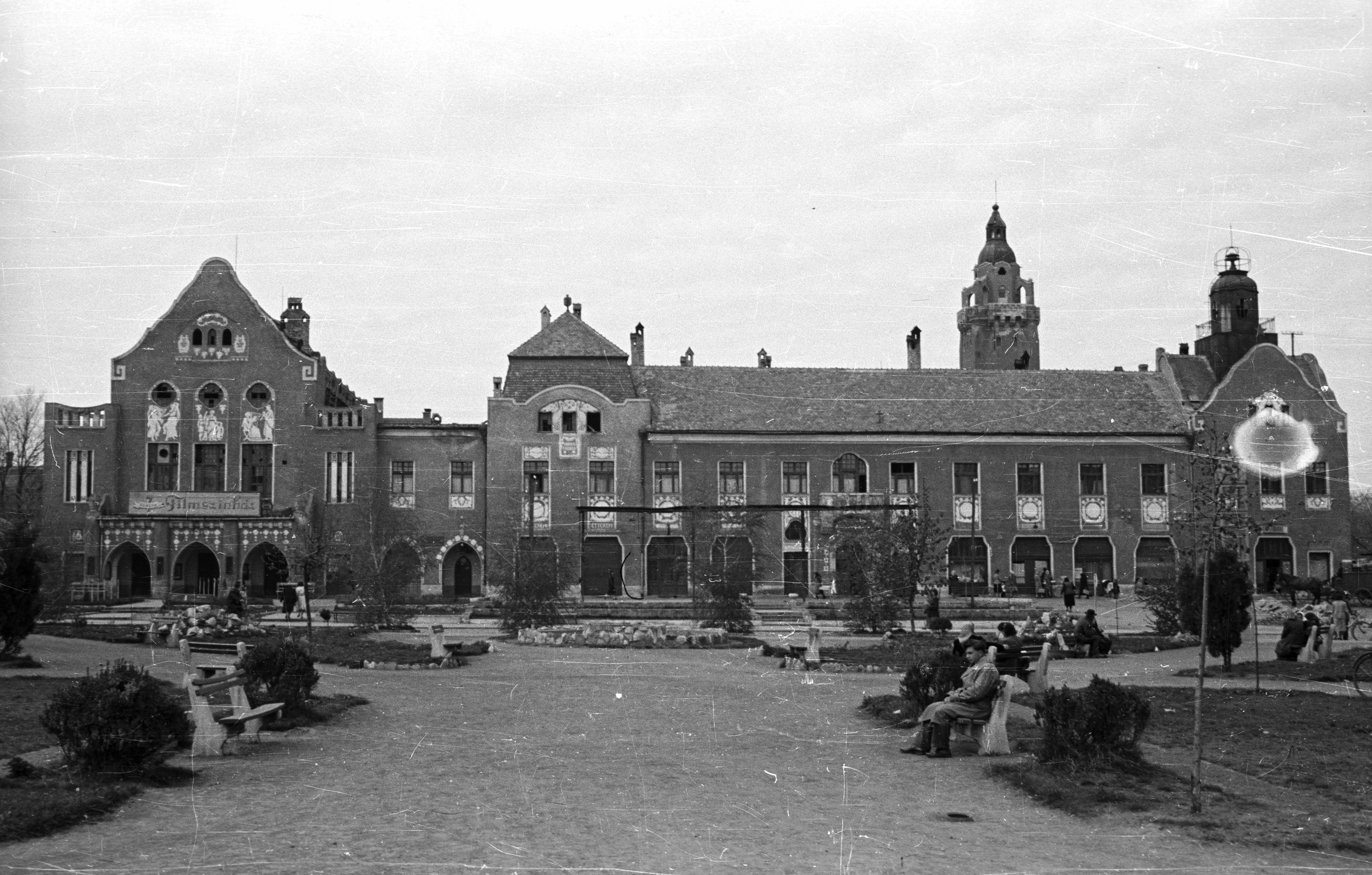 Bethlen Gábor tér, háttérben a Városháza. Location: Hungary, Kiskunhalas Tags: bench Title: Bethlen Gábor tér, háttérben a Városháza.